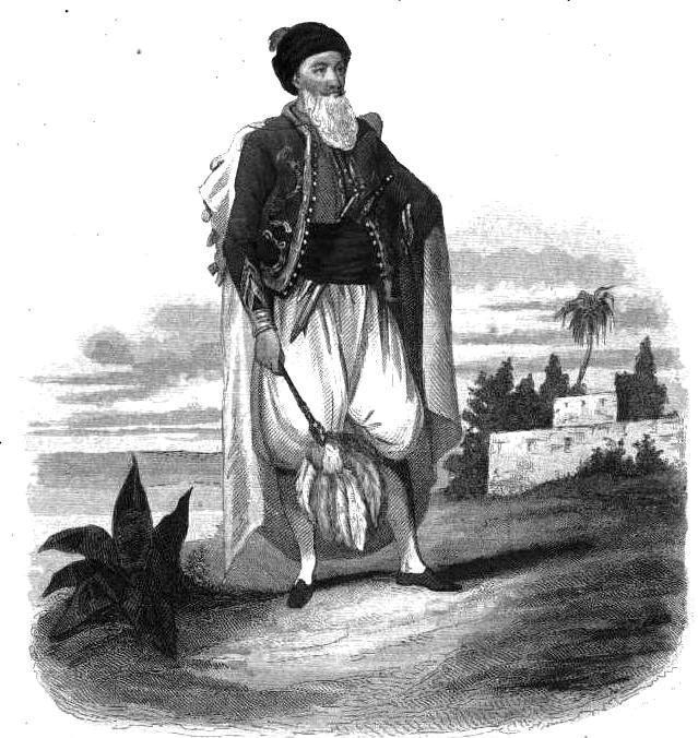 Le Dey d'Alger